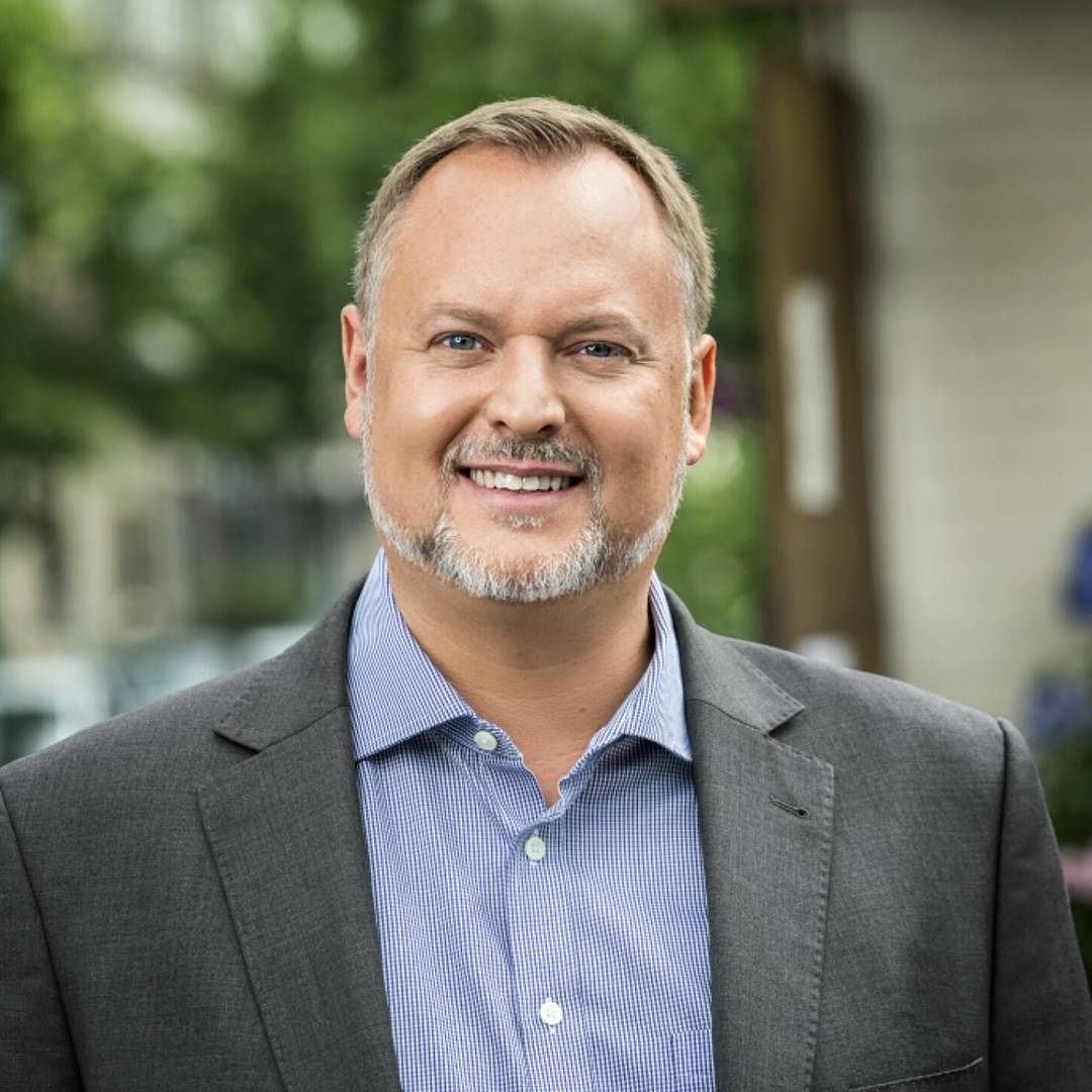 Pressefoto von Falko Liecke 2016